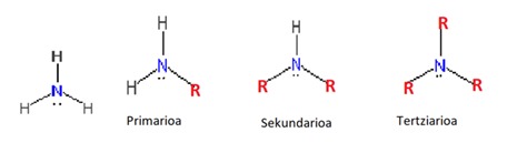 Amoniakoa eta bere deribatuak